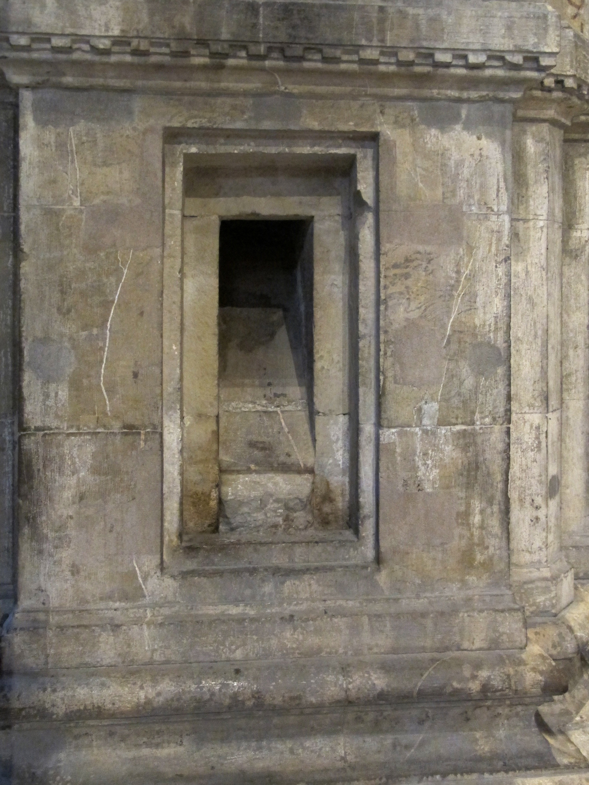 Chiesa di Orsanmichele - MIBAC This is a photo of a monument which is part of cultural heritage of Italy.